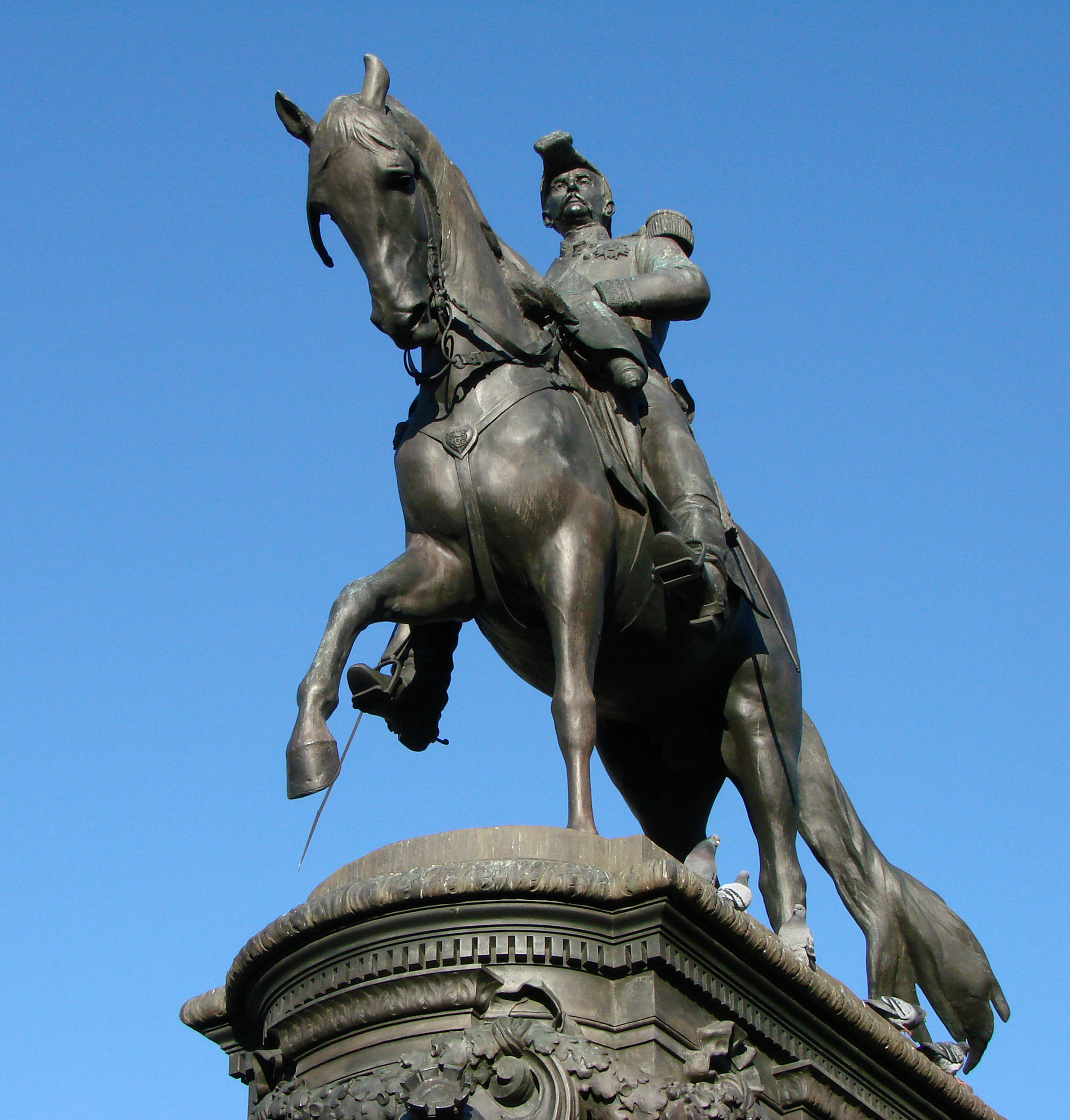 Monument au Général Faidherbe (Lille 3/06/1818-Paris 28/09/1889), place Richebé à Lille. Sculpteur: Antonin Mercié (1845-1916).